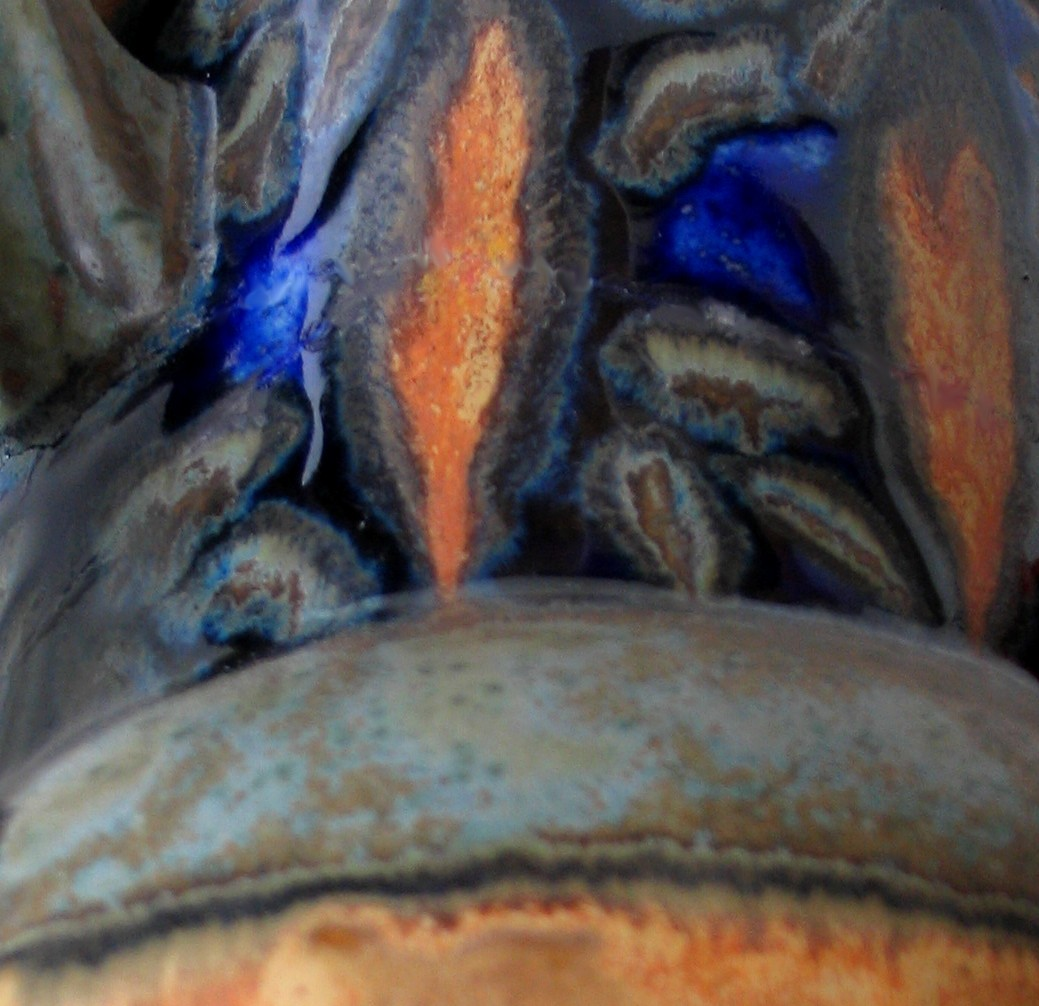 Pichet en grès, manufacture Odetta, France, vers 1930. détail de glaçure